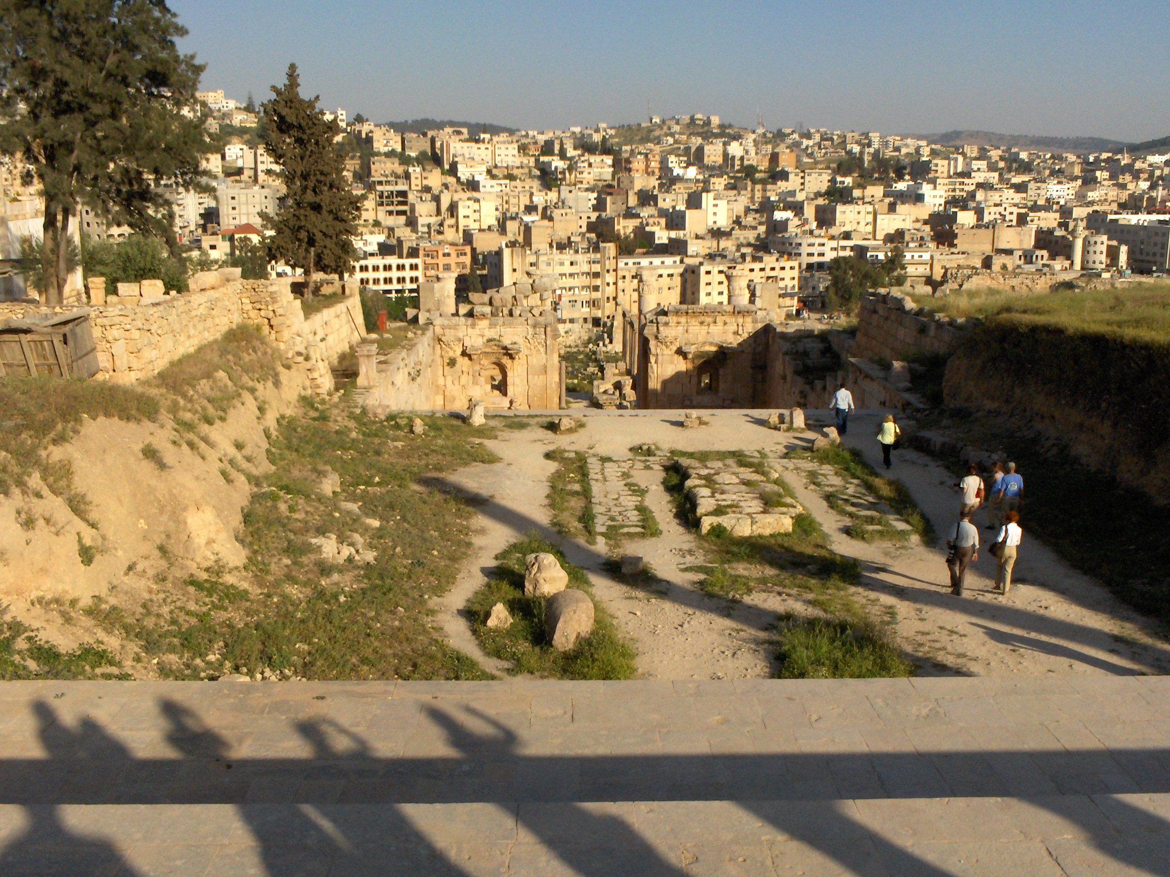 I resti di una piccola chiesa bizantina con alle spalle la città nuova di Jerash, Giordania